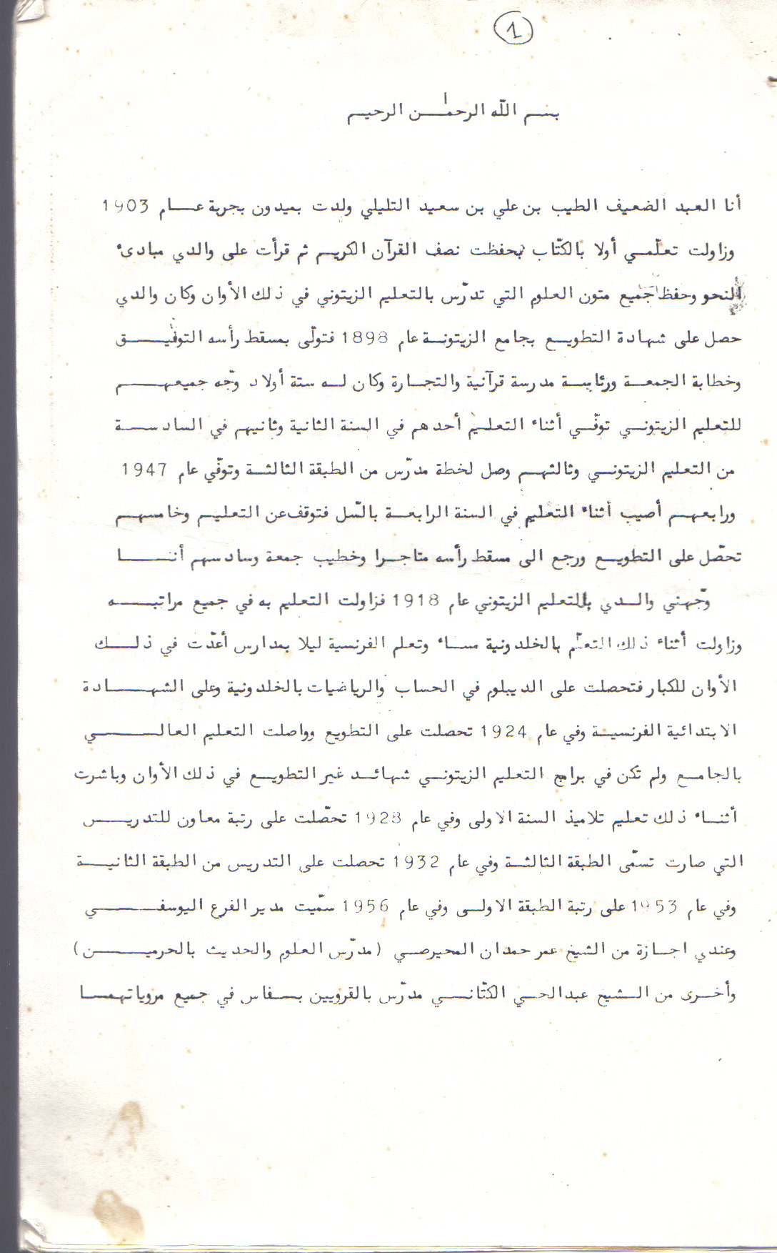 السيرة الذاتية للشيخ الطيب التليلي، ص 1